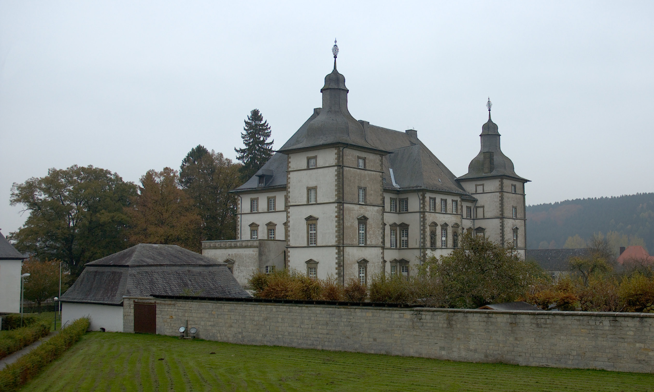 Deutschordensschloss in Mülheim/Möhne